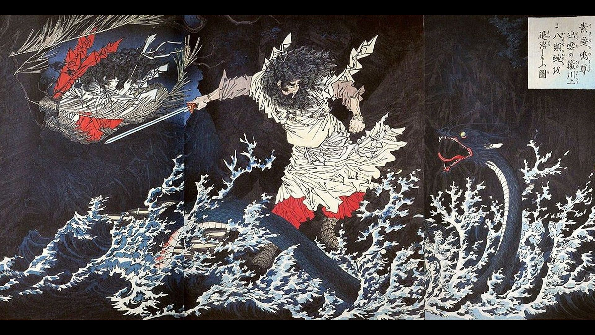 Nihon-ryakushi Susanoo-no-mikoto (日本略史・素戔鳴尊)